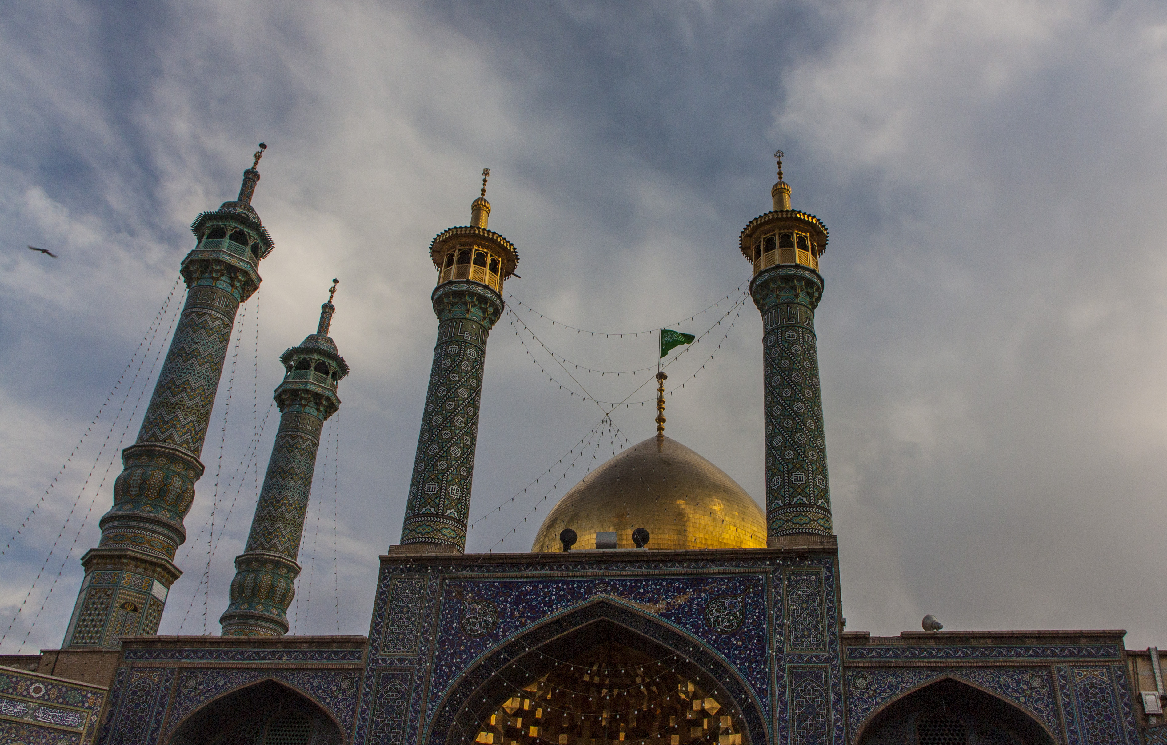 Santuario di Fatima Masumeh